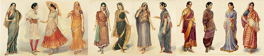 Styles of Sari